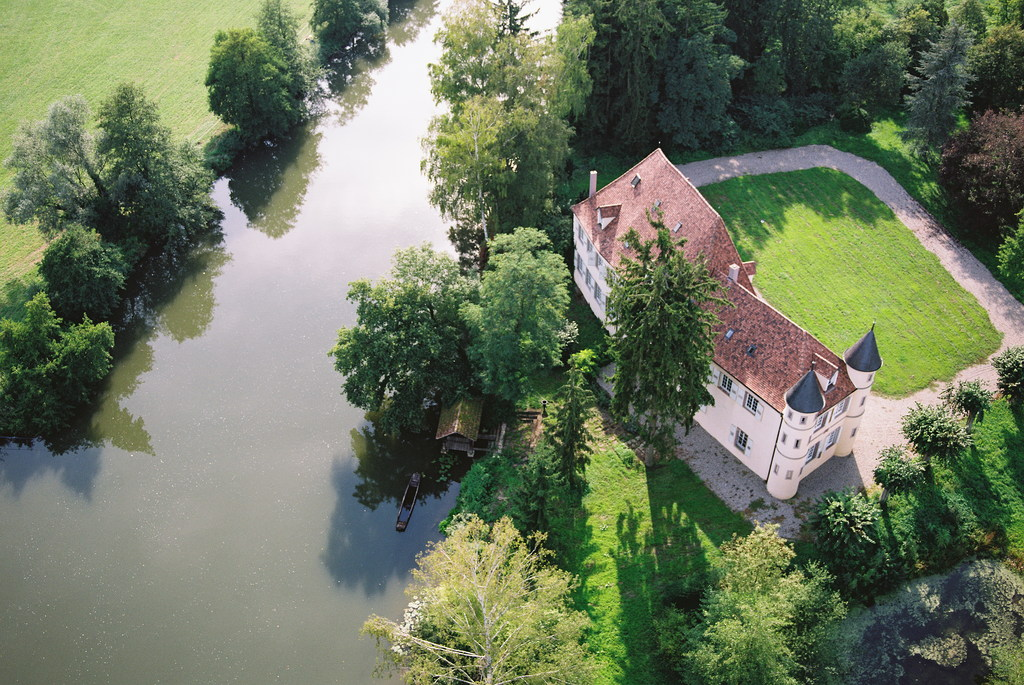 Castillo de Werde, sobre el río Ill.